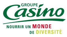 Logo Groupe Casino